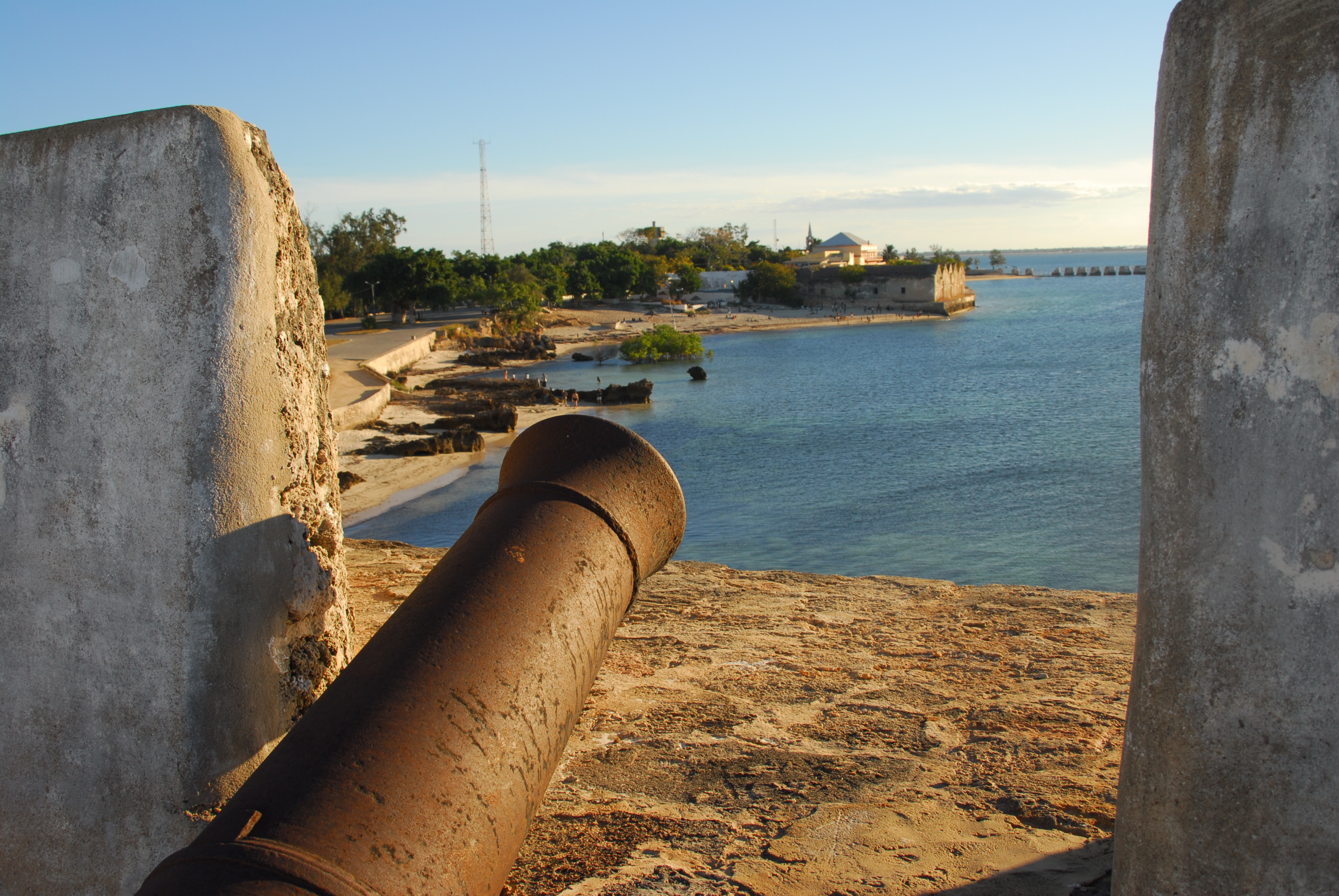 Fortaleza de S. Sebastiao, Ilha de Moçambique, Mozambique